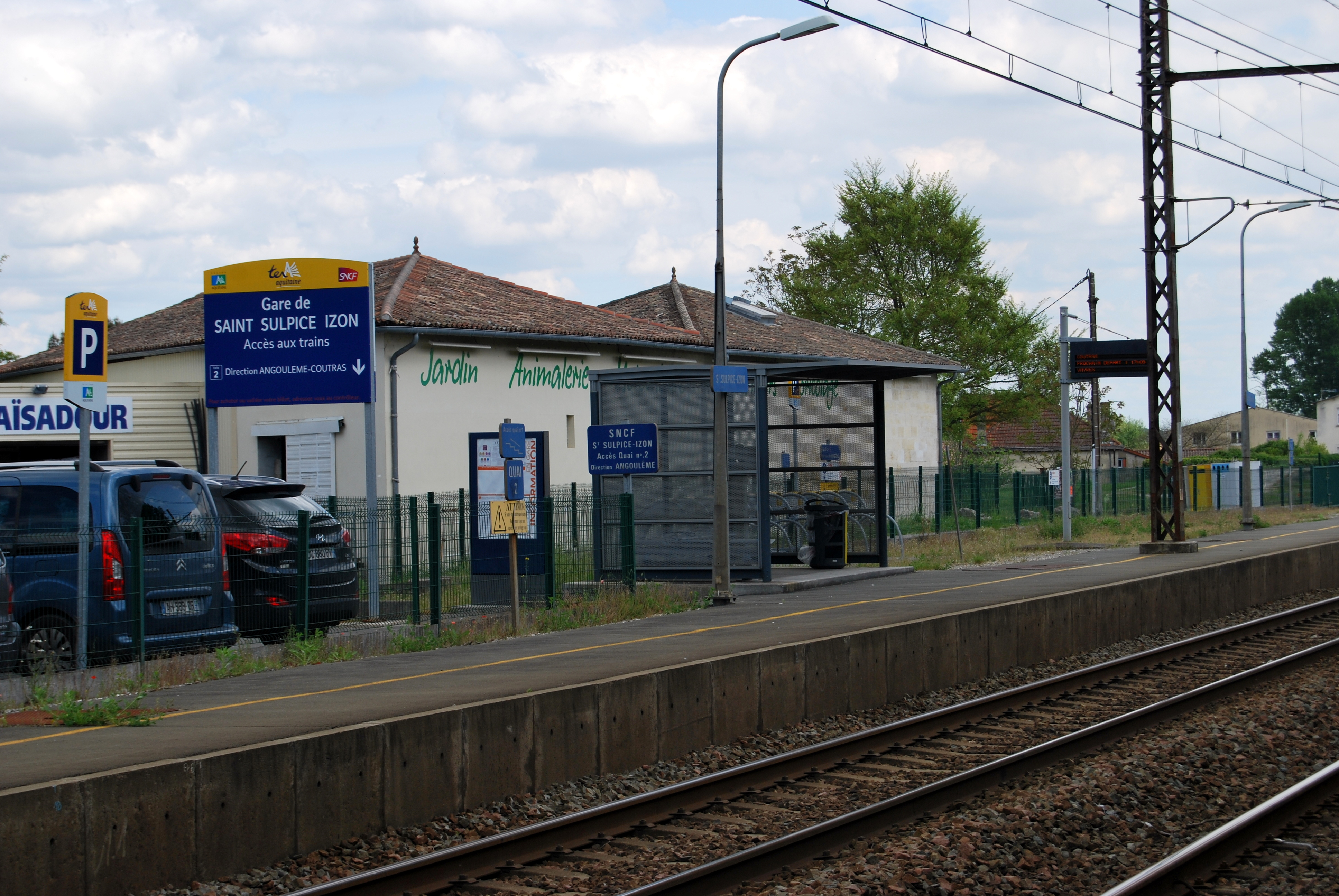 Gare de Saint-Sulpice-Izon